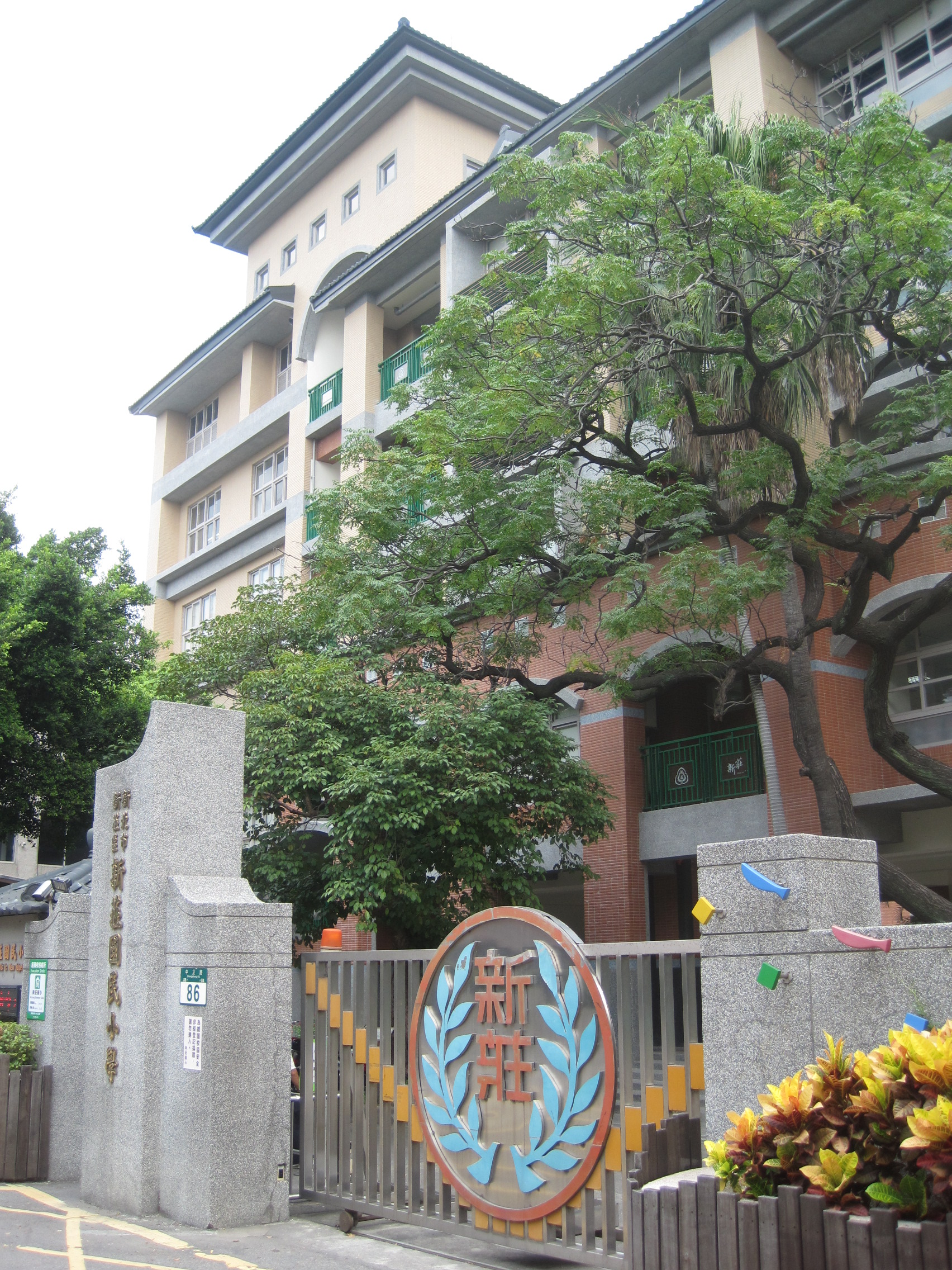 新莊國小校門